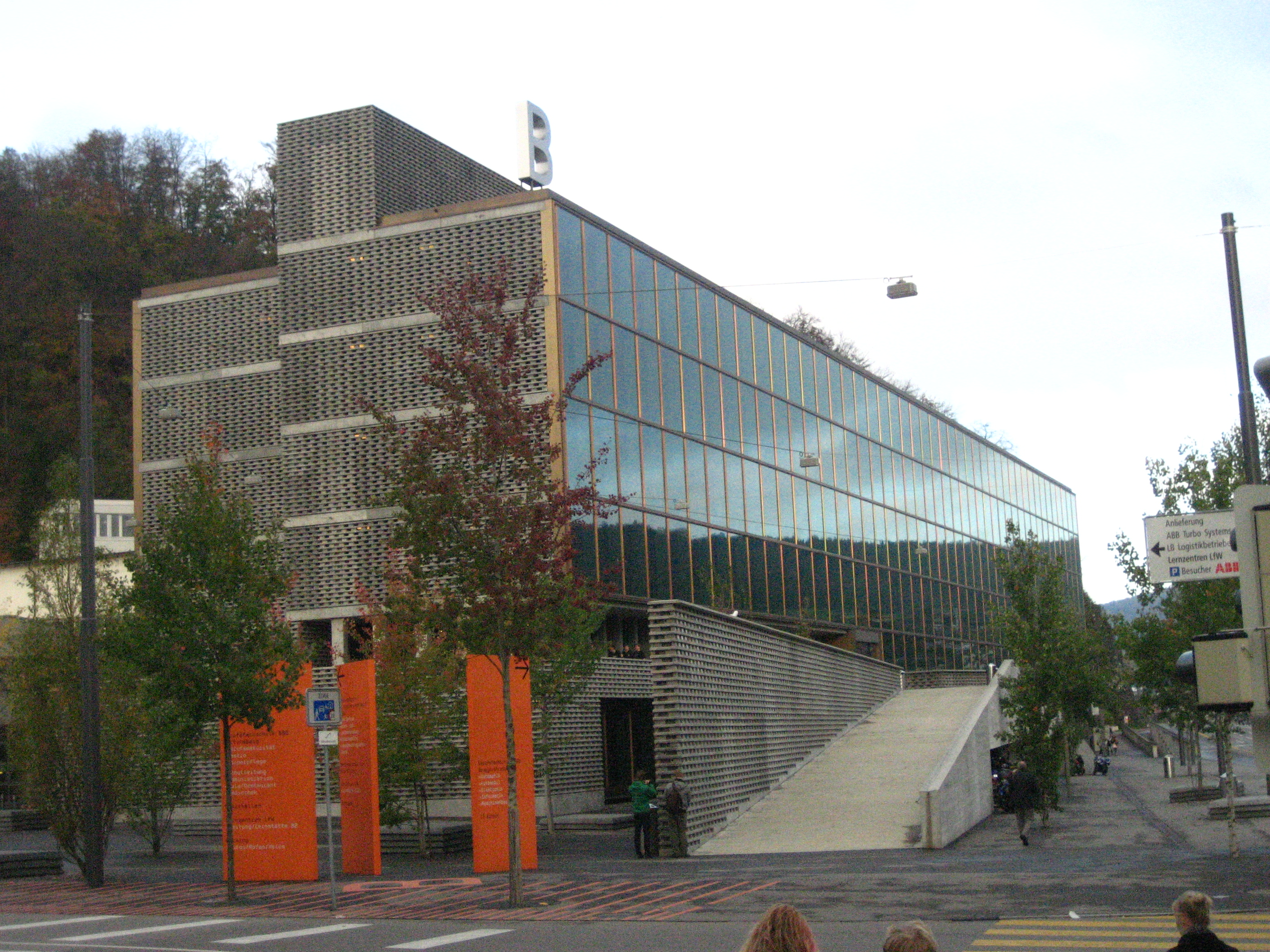 Berufsbildungszentrum Bruggerstrasse in Baden AG, Schweiz. Baujahr:2002-2006. Architekt: Burkard Meyer